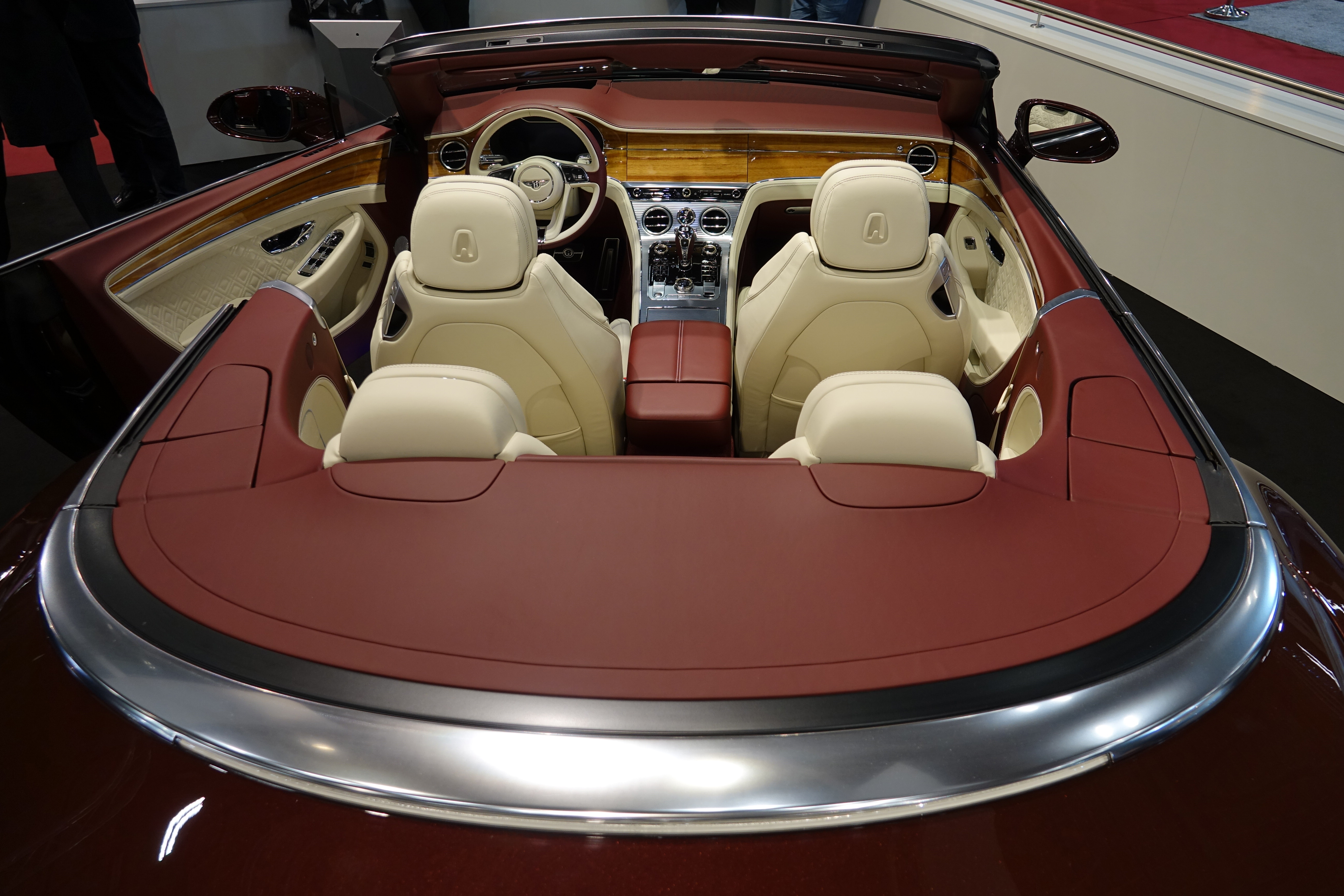 Bentley Continental GTC II à Rétromobile 2019